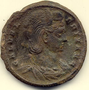 Roman Coin - Valeria Galeria